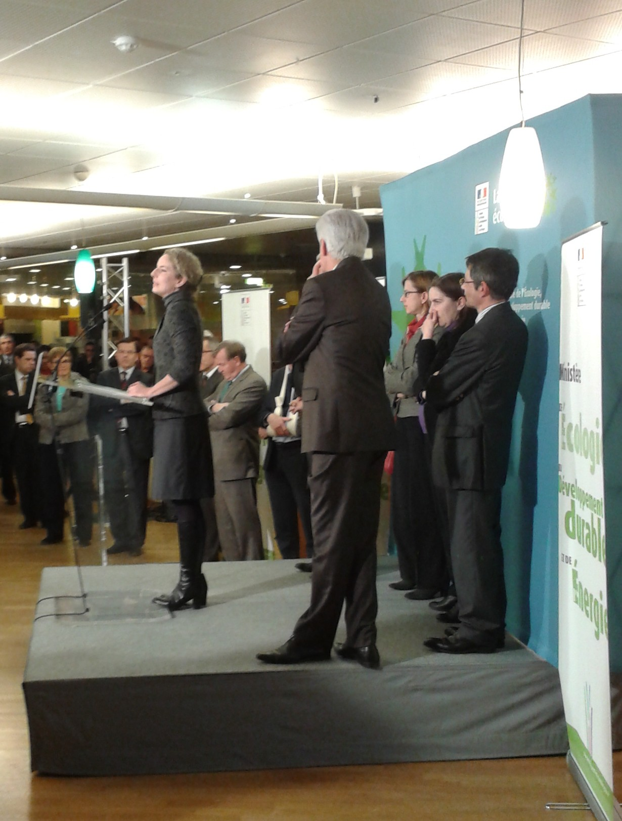 Delphine Batho prononçant une allocution dans les locaux du Ministère de l'écologie, du développement durable et de l'énergie